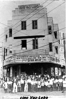 Cine VAZ LOBO